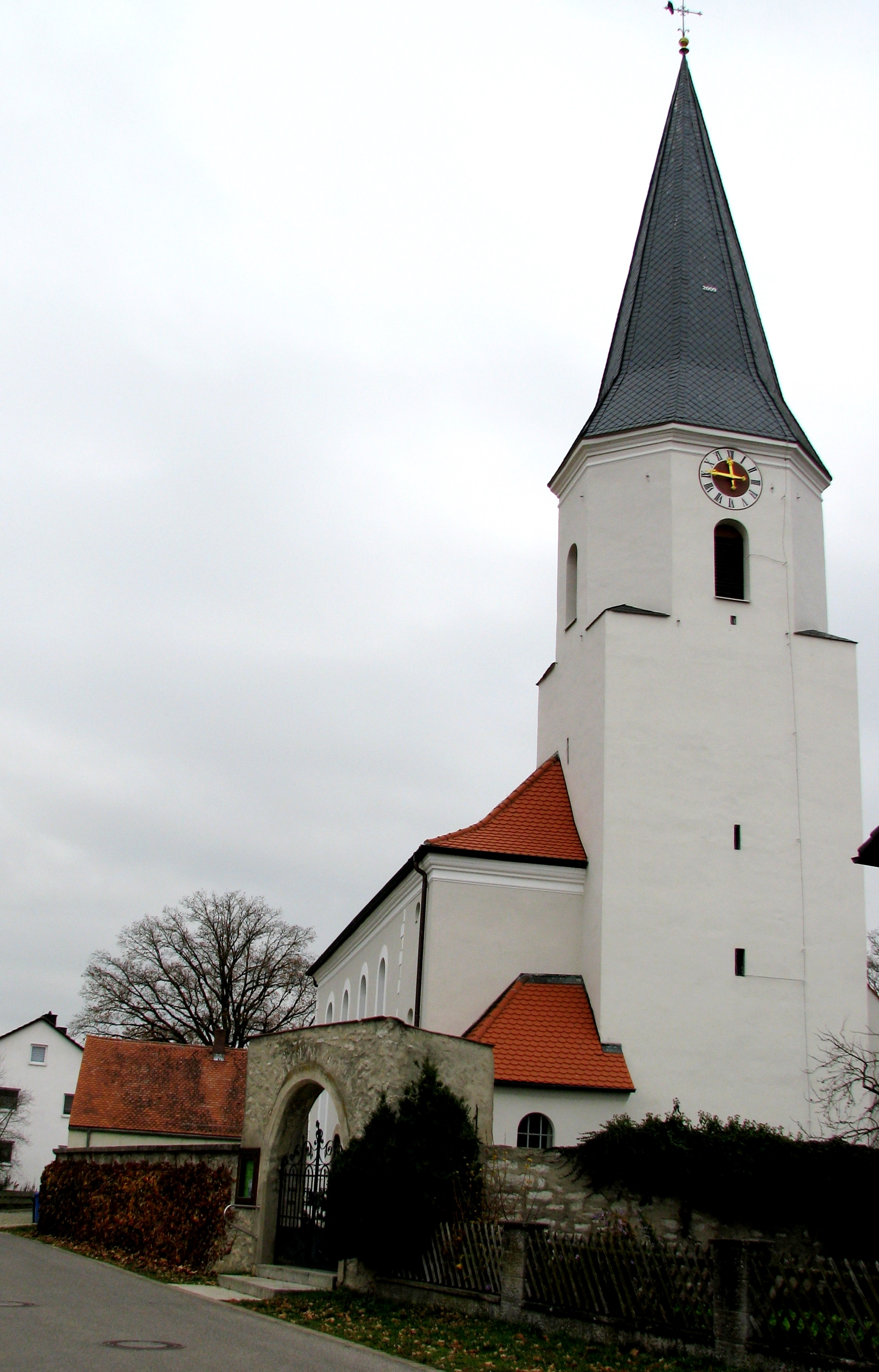 Bachhausen, Ortsteil von Mühlhausen im Landkreis Neumarkt in der Oberpfalz, Evangelische Petruskirche